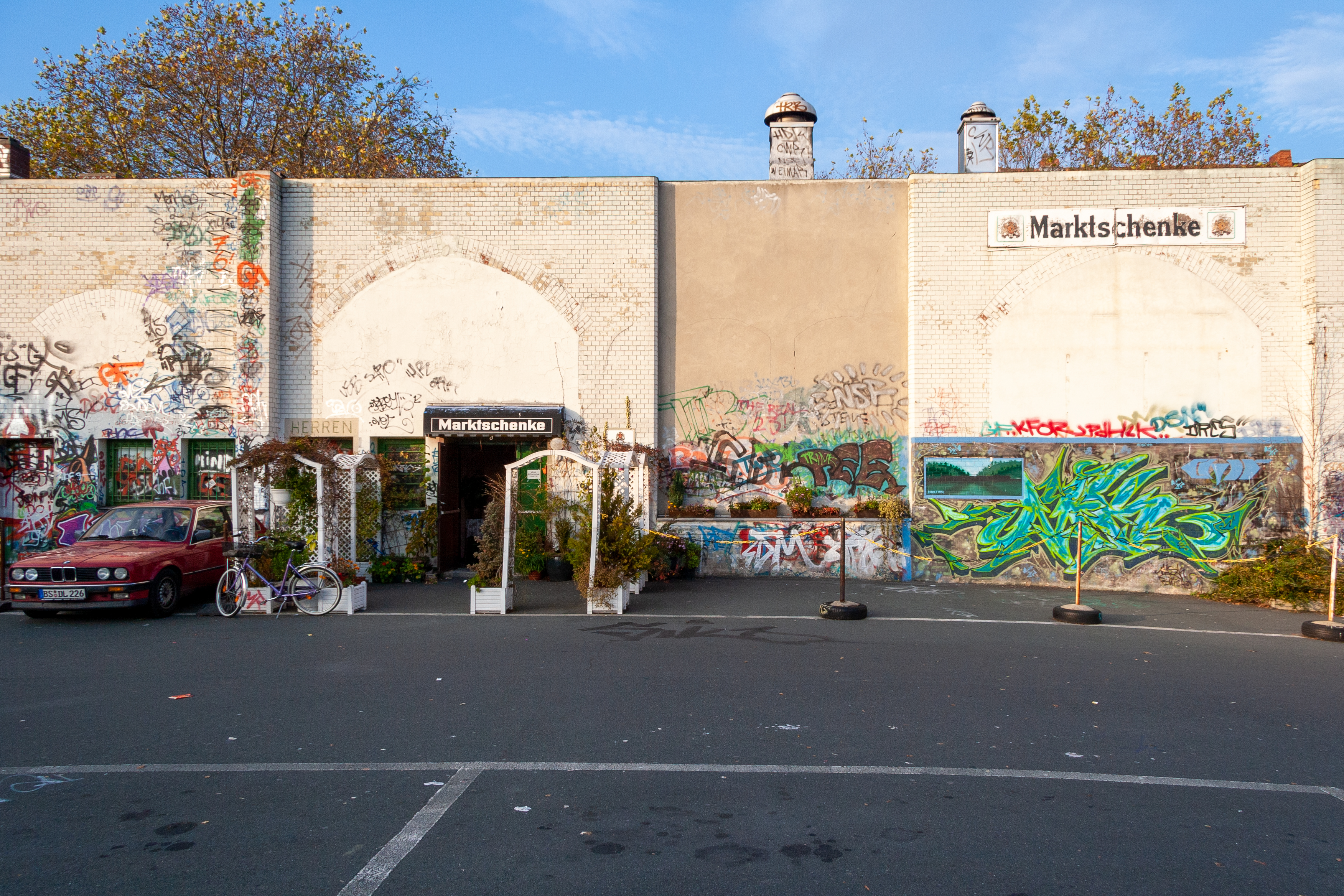 Gaststätte auf dem Gelände der früheren Markthalle